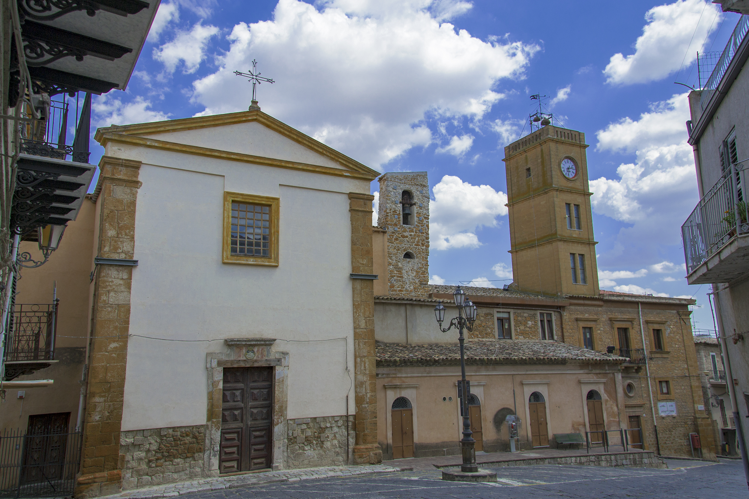 Palazzo Comunale This is a photo of a monument which is part of cultural heritage of Italy.